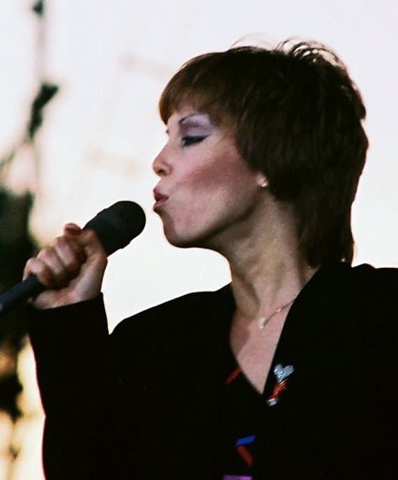 Pat Benatar, live, 2007-09-07